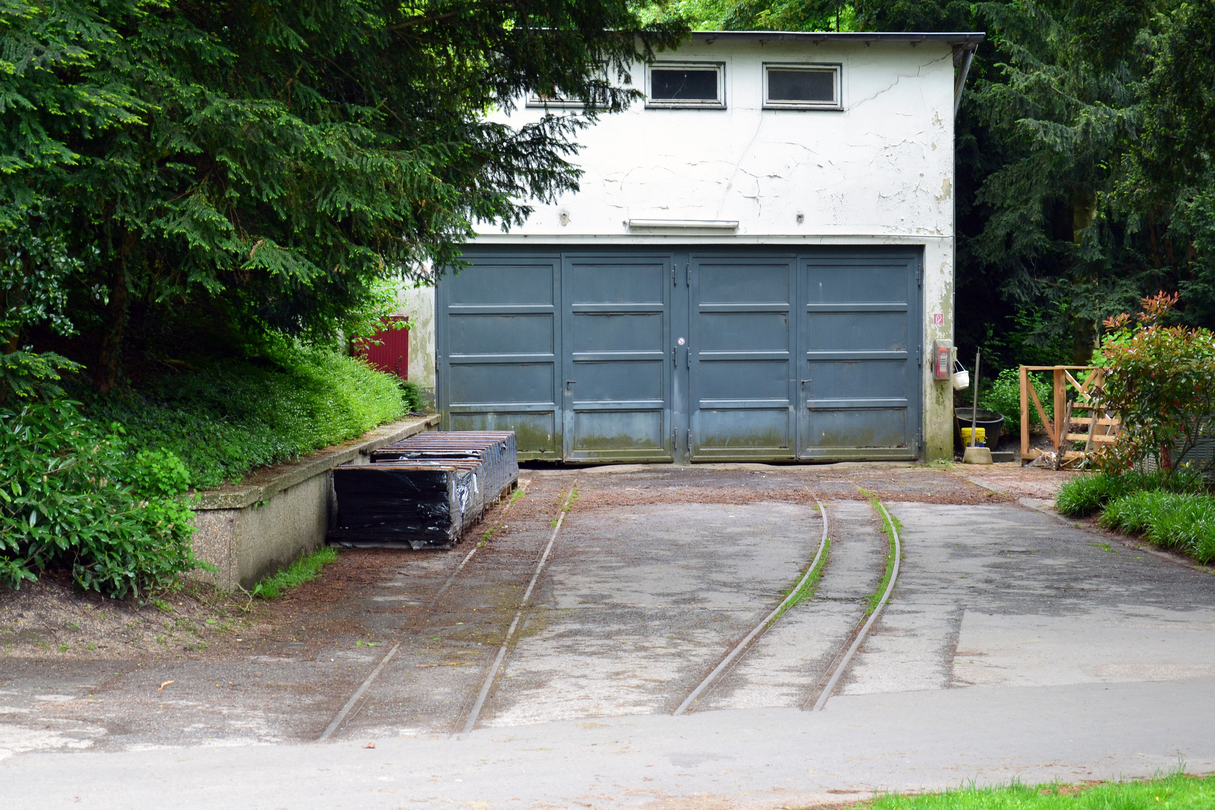 Grugabahn im Grugapark Essen, ehem. Depot